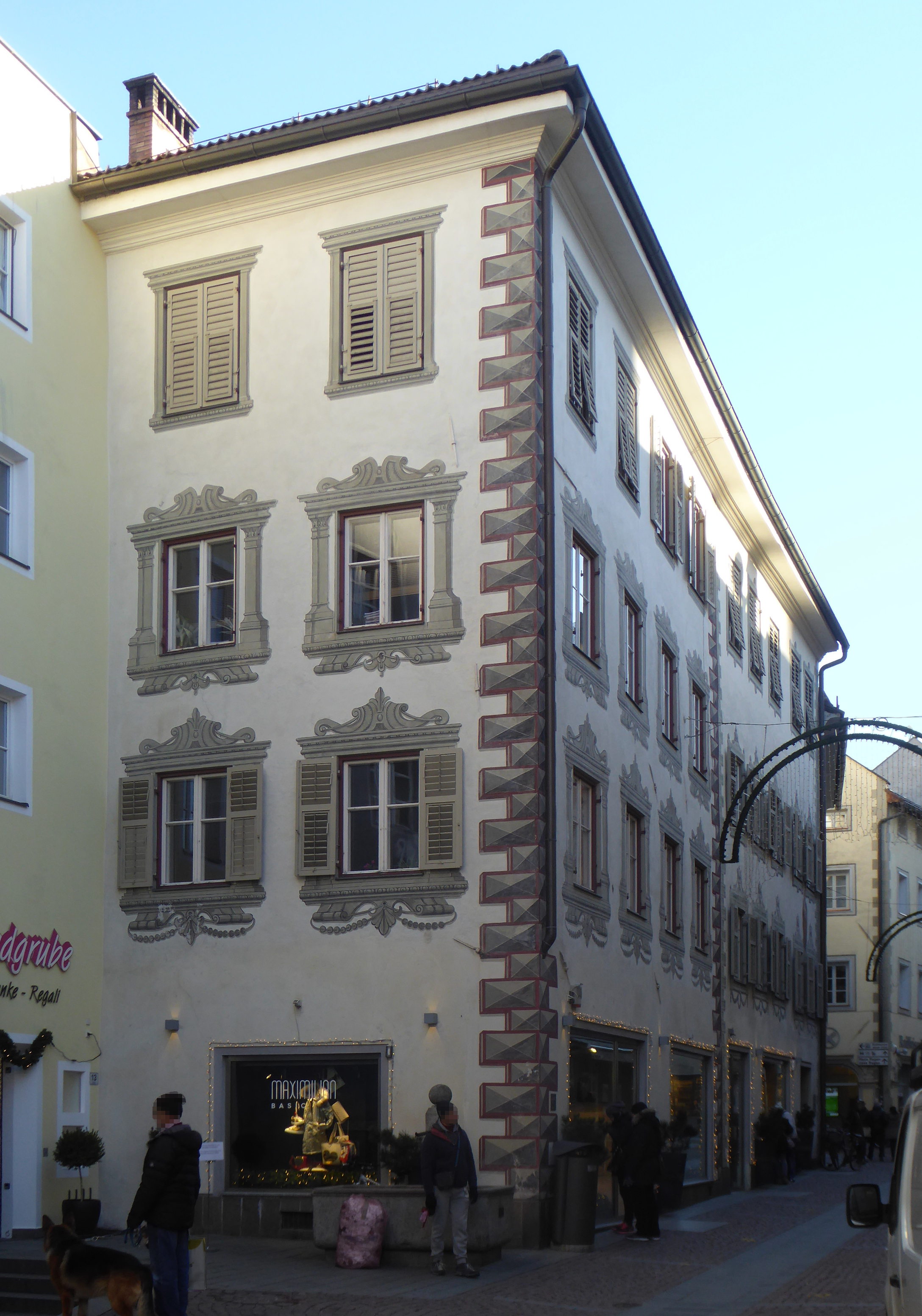 Bruneck (Südtirol), Wohnhaus Stadtgasse 11.